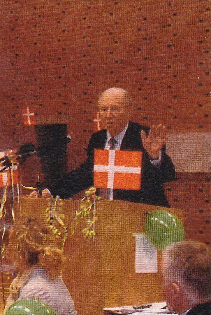 Thokild Simonsen, tidligere skoleinspektør og borgmester i Århus samt tidligere minister holdt en åbningstale ved Danske Skoleelevers første generalforsamling på Jellebakkeskolen i Århus d. 17.-18. april 2004. Thorkild Simonsen holdt tillige åbningstalen i 1969 da den daværende Landsorganisationen af Elever blev dannet.